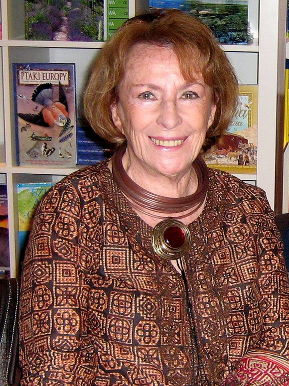 Wanda Chotomska (ur. 26 października 1929 w Warszawie), polska pisarka, autorka książek dla dzieci i młodzieży.